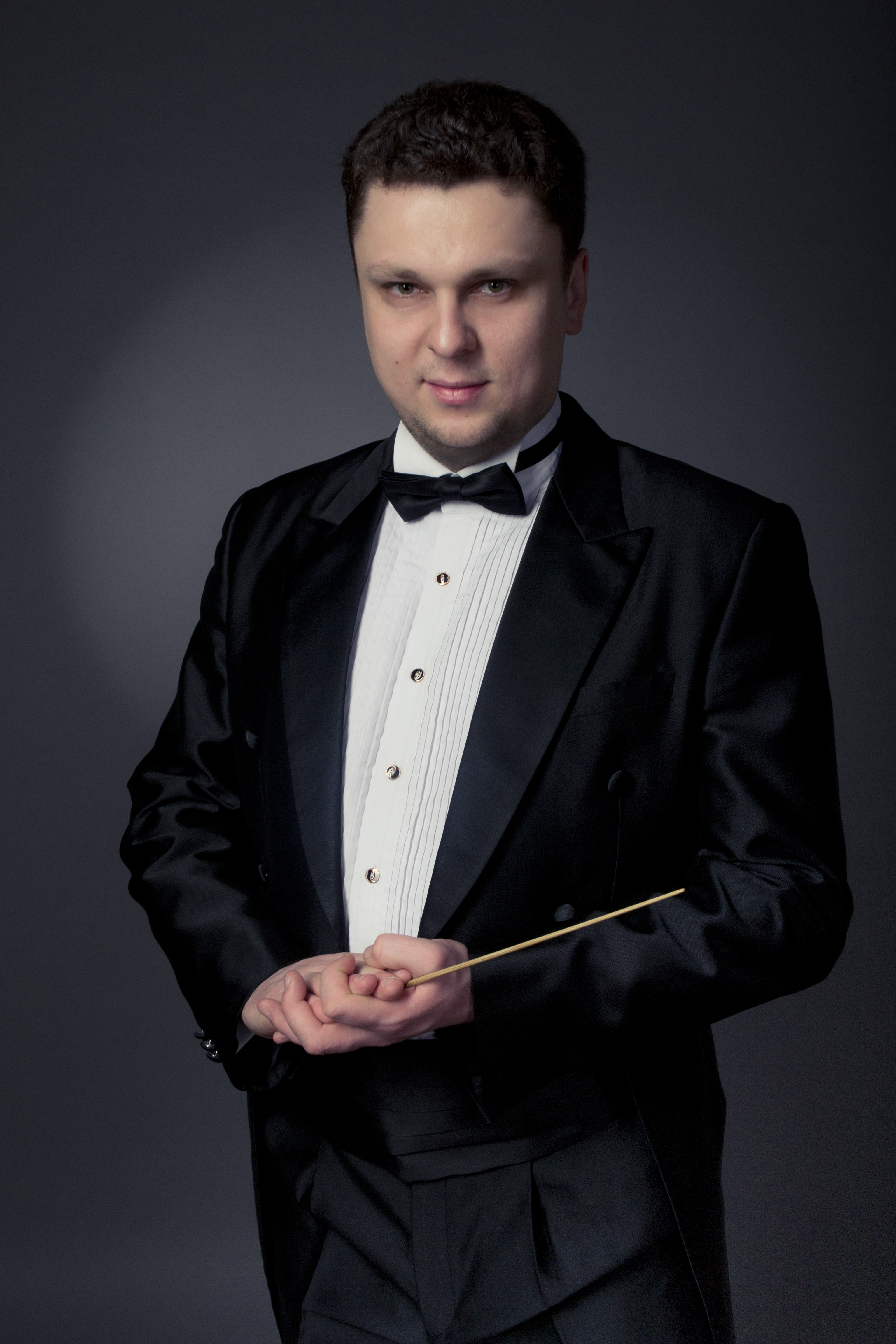 Михаил Голиков, директор художественный руководитель и главный дирижер Государственной филармонии Санкт-Петербурга для детей и юношества, художественный руководитель и главный дирижер Международного оркестра "Таврический"